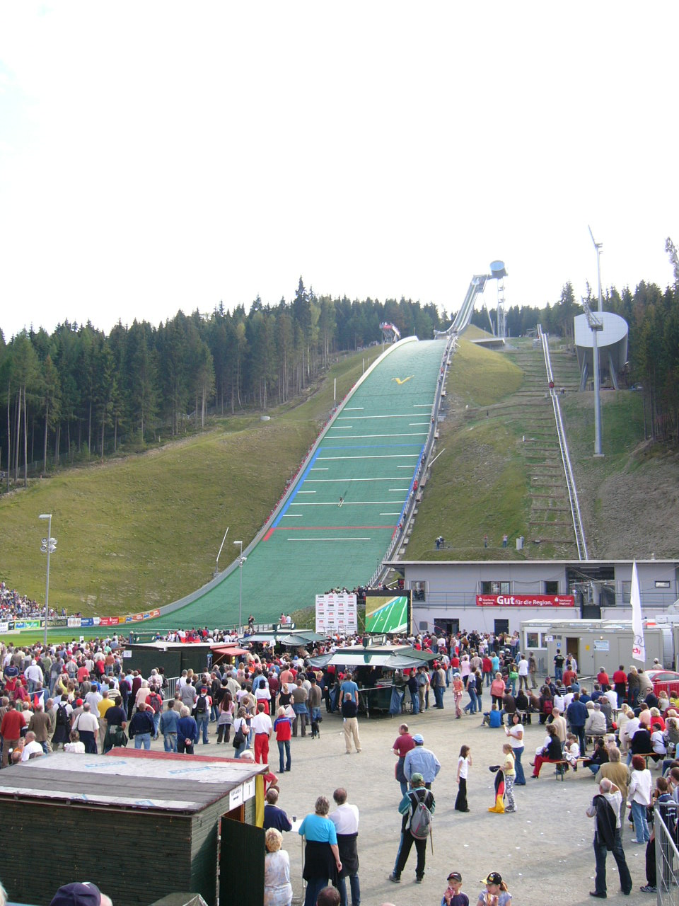 Großschanze Vogtlandarena Klingenthal/Sa. Germany, Sommer Grand-Prix 2007